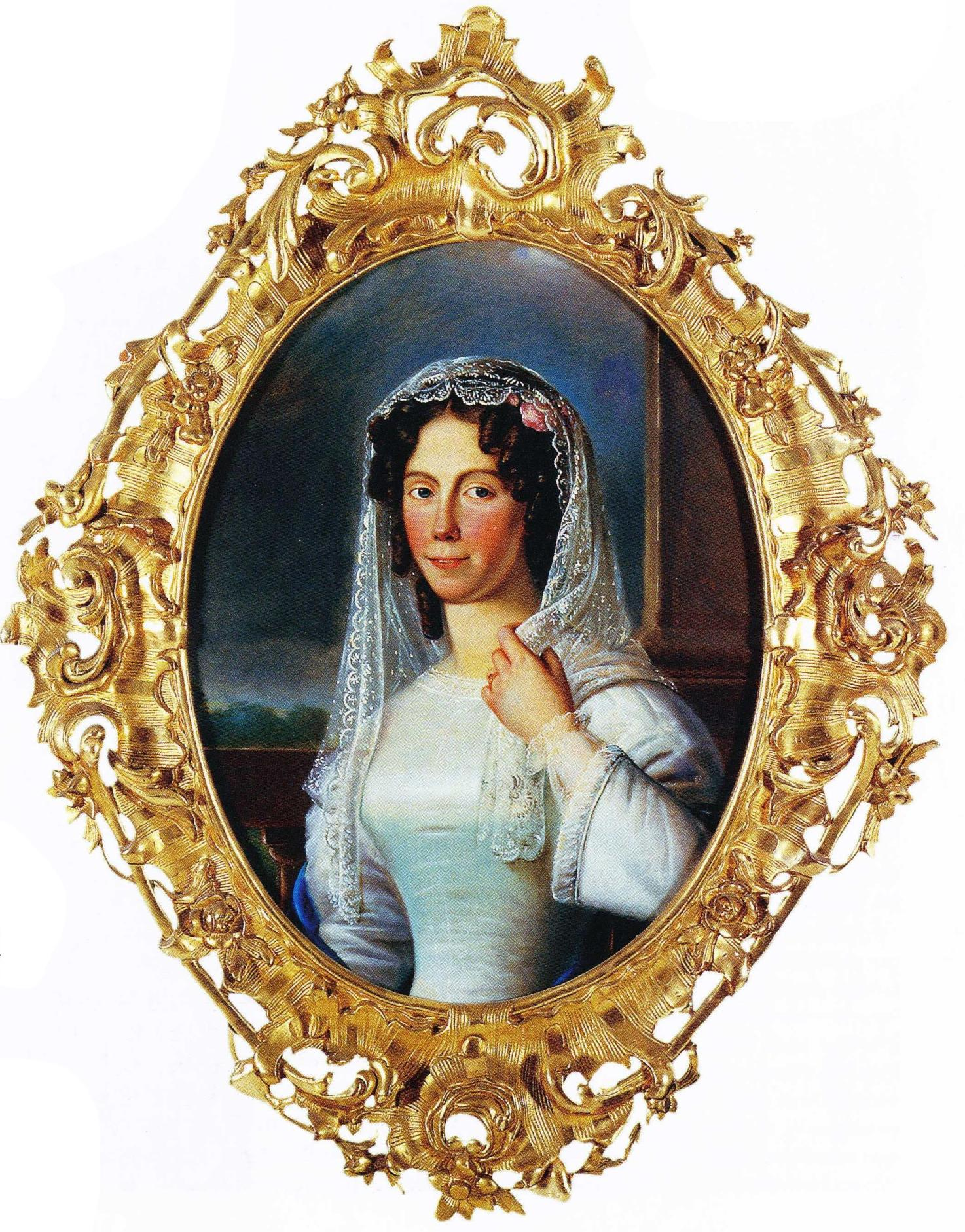 Kreivitär Sigrid Axelina Fredrika Oxenstierna-Armfelt, syntyjään Oxenstierna af Eka och Lindö (1801–1841), ministerivaltiosihteeri Alexander Armfeltin puoliso.